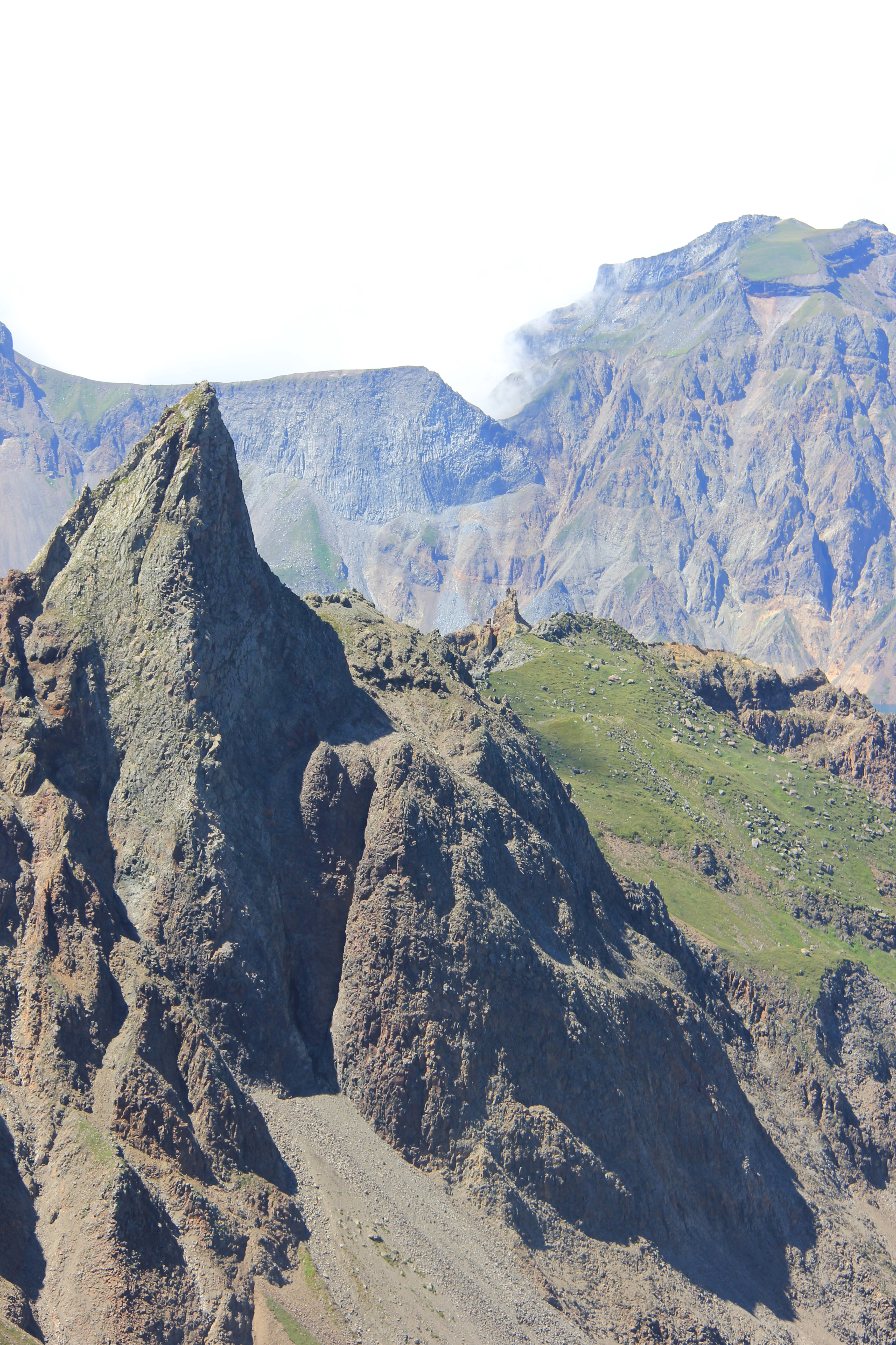 Mt. Paekdu